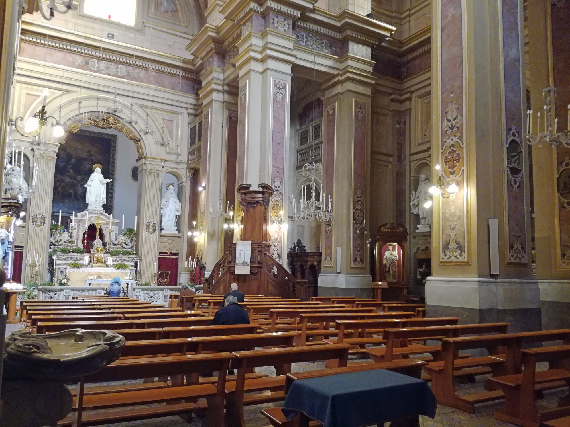 Chiesa di Santa Teresa a Chiaia (Napoli)